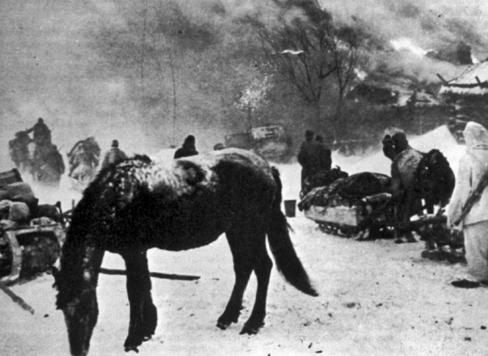 Sceljakino in fiamme dopo i combattimenti del 20 gennaio durante la ritirata dal fronte del Don